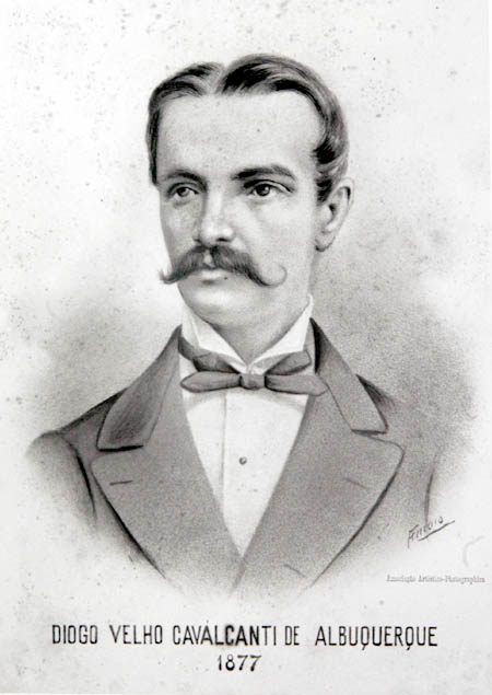 Diogo Velho Cavalcanti de Albuquerque, o Visconde de Cavalcante.